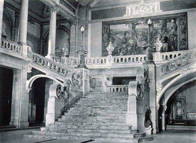 Le grand escalier de la Cour d'appel de Colmar, (1900?). Bibliothèque nationale et universitaire de Strasbourg